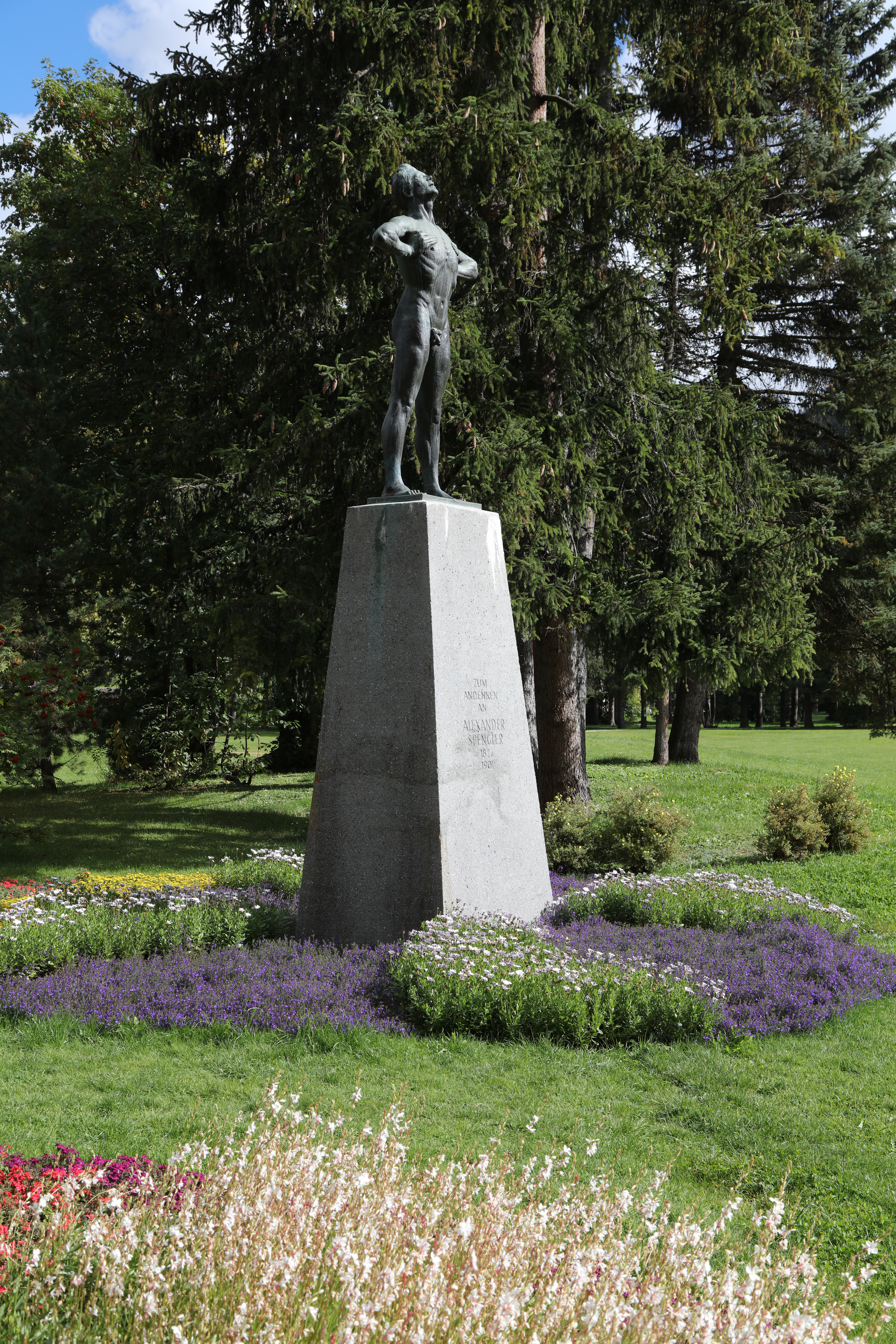 Das im Kurgarten von Davos aufgestellte Denkmal für Alexander Spengler, wurde von Philipp Modrow geschaffen und 1924 aufgestellt.